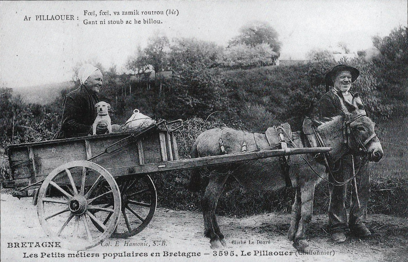 Un pilhaouer et sa charrette vers 1905 (carte postale Emile Hamonic).